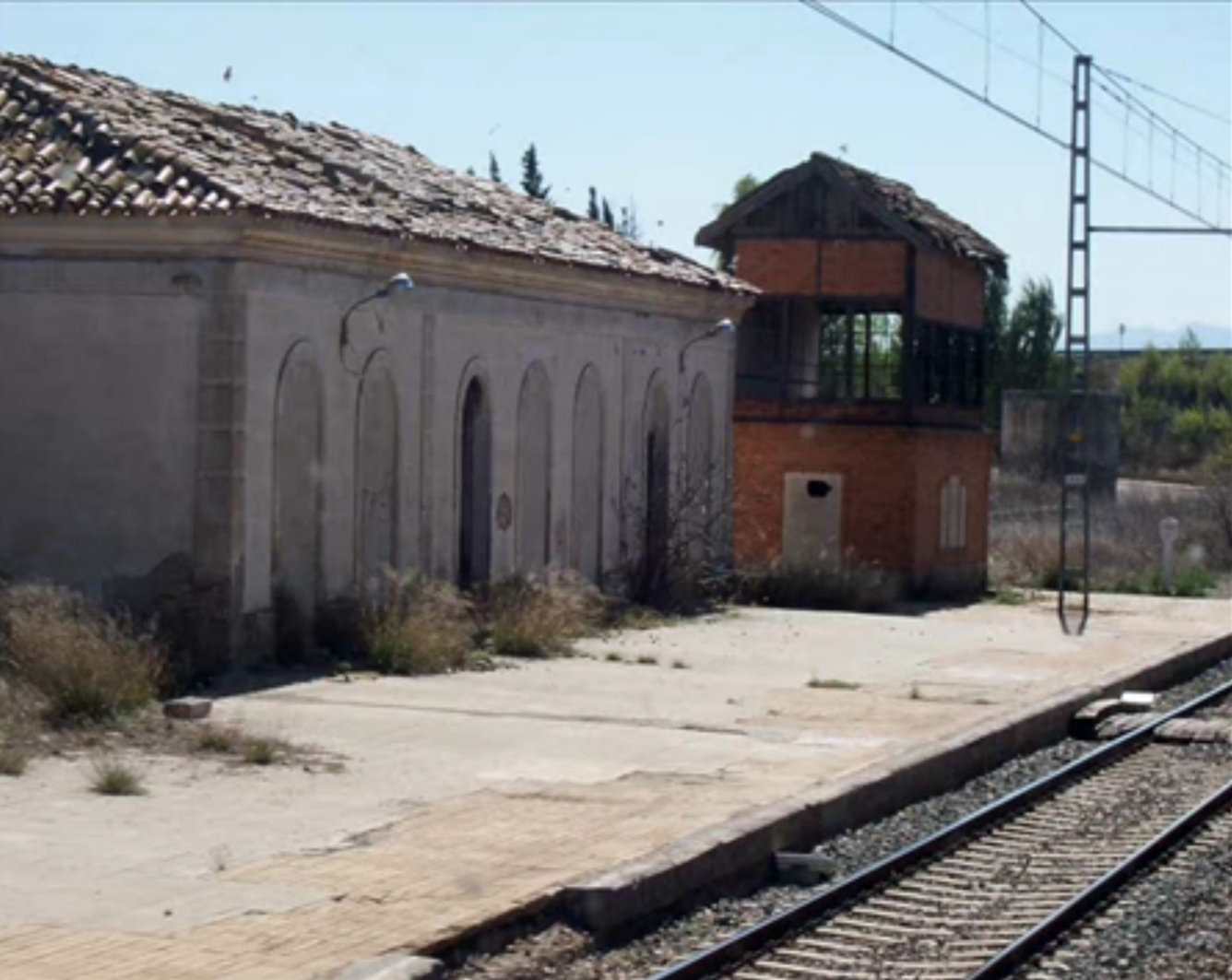 Estación de Ruedade Jalón-Lumpiaque antes de su demolición. En la foto se ve el antiguo andén sin recrecer, el edificio de viajeros y la torre de enclavamientos.